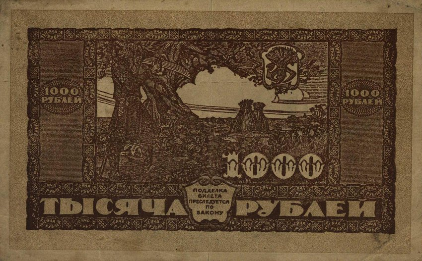 Государственный кредитный билет ДВР 1000 рублей 1920. Реверс.